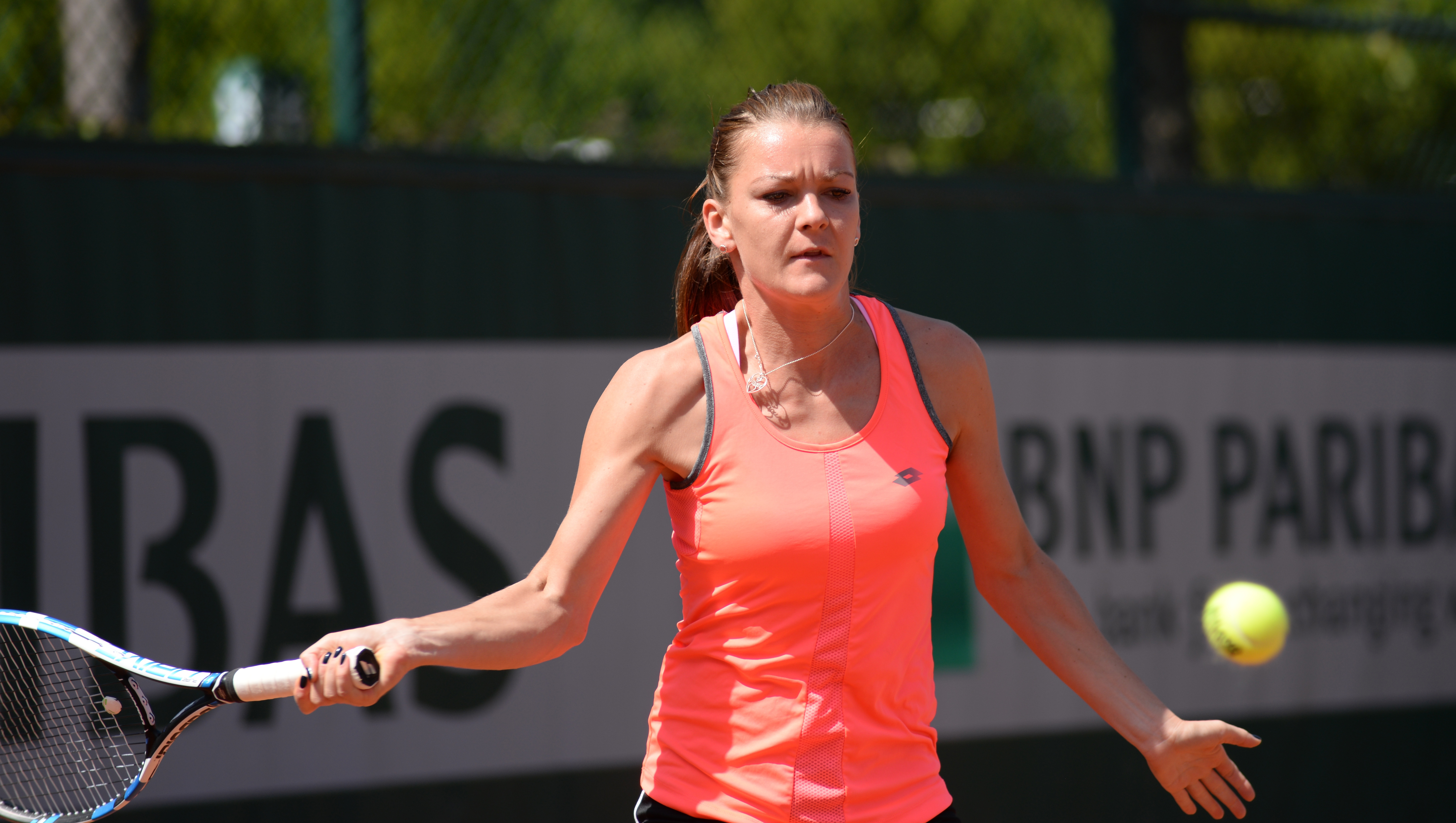 Agnieszka Radwanska